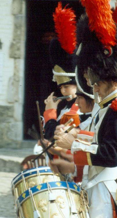 Tambours et fifres d'un groupe participant à la reconstitution, Plancenoit, juin 2006